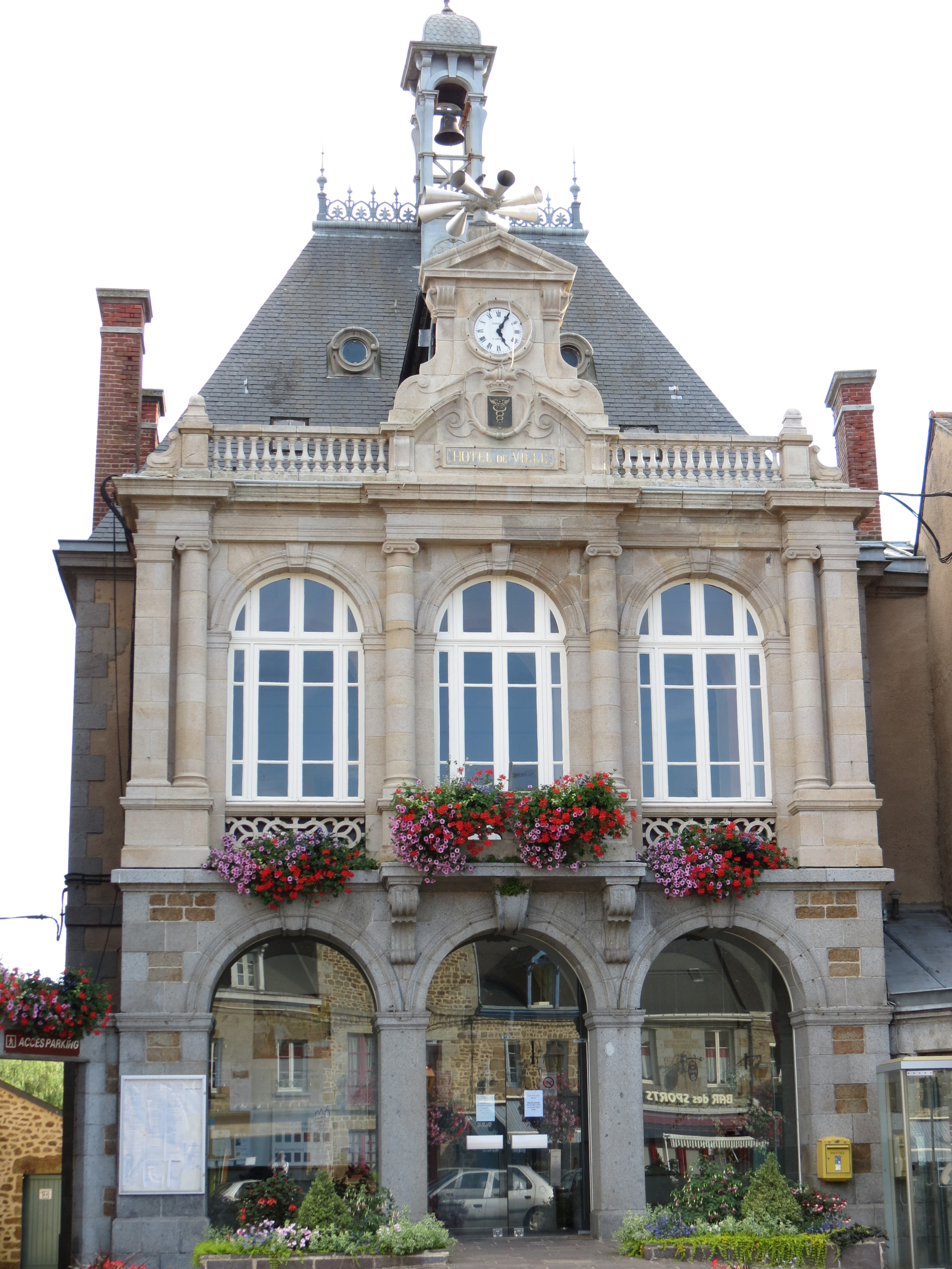 Mairie de Lassay